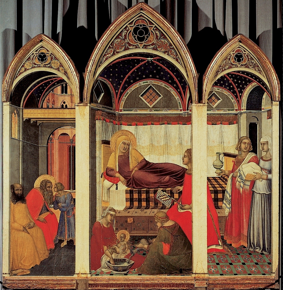 Nativity-of-the-virgin-pietro_lorenzetti_siena_museo_dell'Opera_del_duomo.jpg